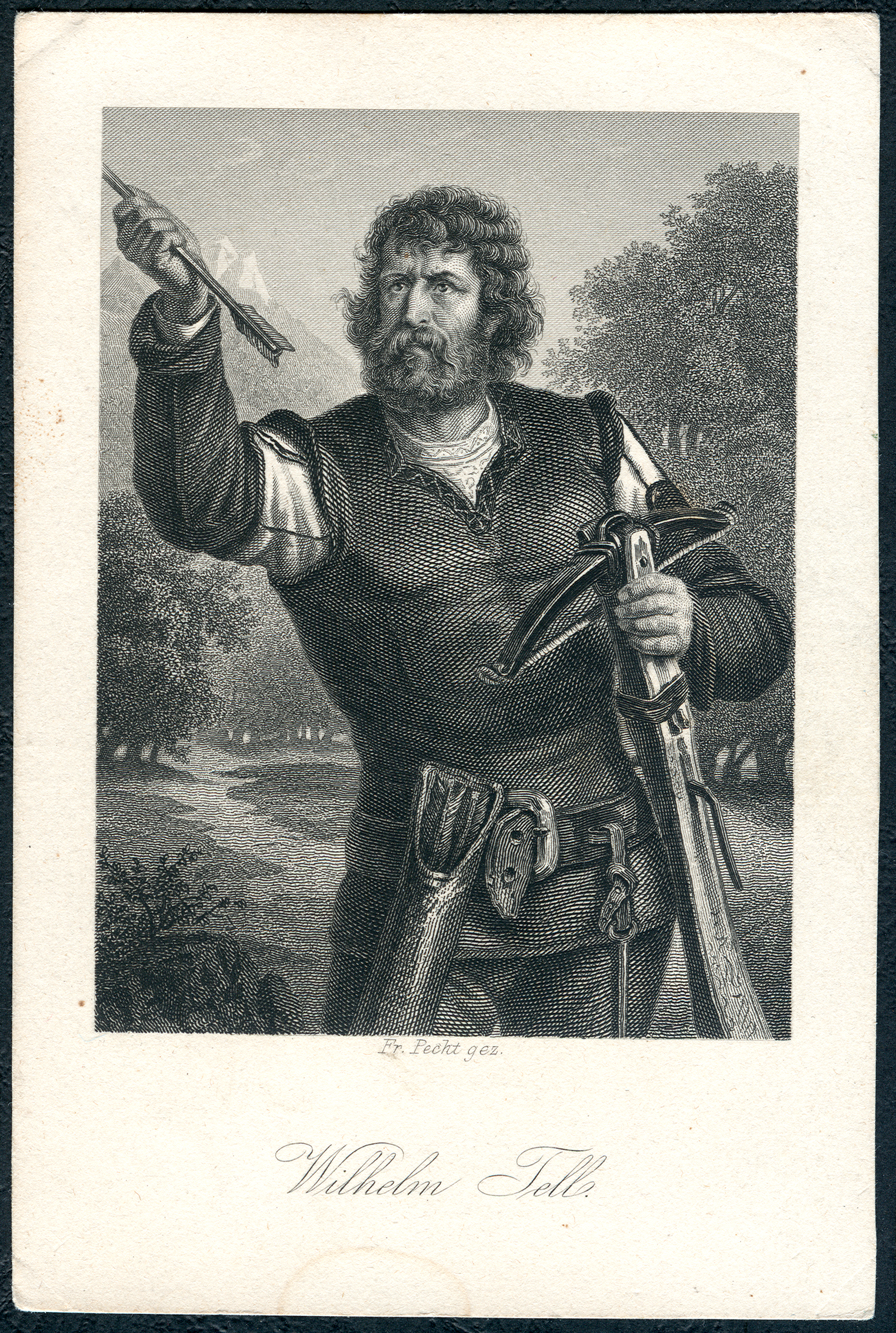 Wilhelm Tell aus Friedrich Schillers Wilhelm Tell, als Stahlstich gestochen von Johann Leonhard Raab um 1859 nach einer Zeichnung von Arthur von Ramberg; das untertitelte Blatt hat die Maße circa 8 cm x 11,6 cm und auf der Rückseite keine weiteren Angaben. Es gehört zu einer Serie, möglicherweise als frühes Sammelbild, die als Schiller-Galerie von Friedrich Pecht und von Arthur von Ramberg bekannt geworden ist.